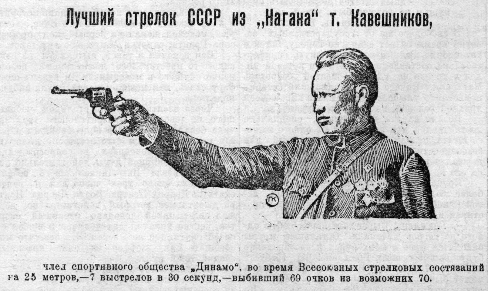 Кавешников В. А. Рисунок из газеты "Бурят-Монгольская правда" №205. 12 сентября 1926 года